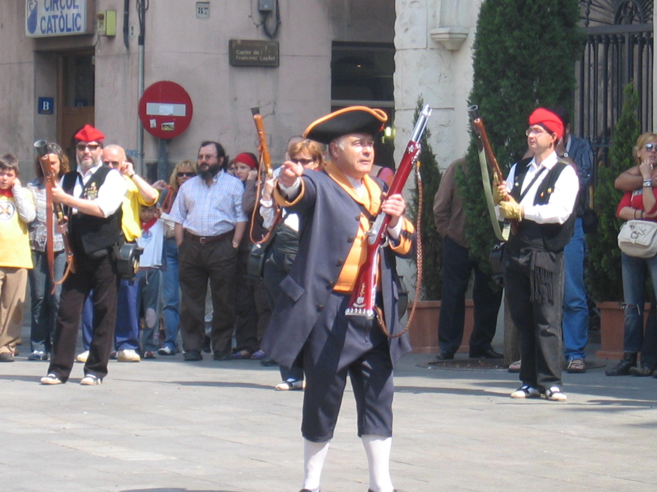 Descàrrega a la Plaça de la Vila per les Festes de Maig del 2006